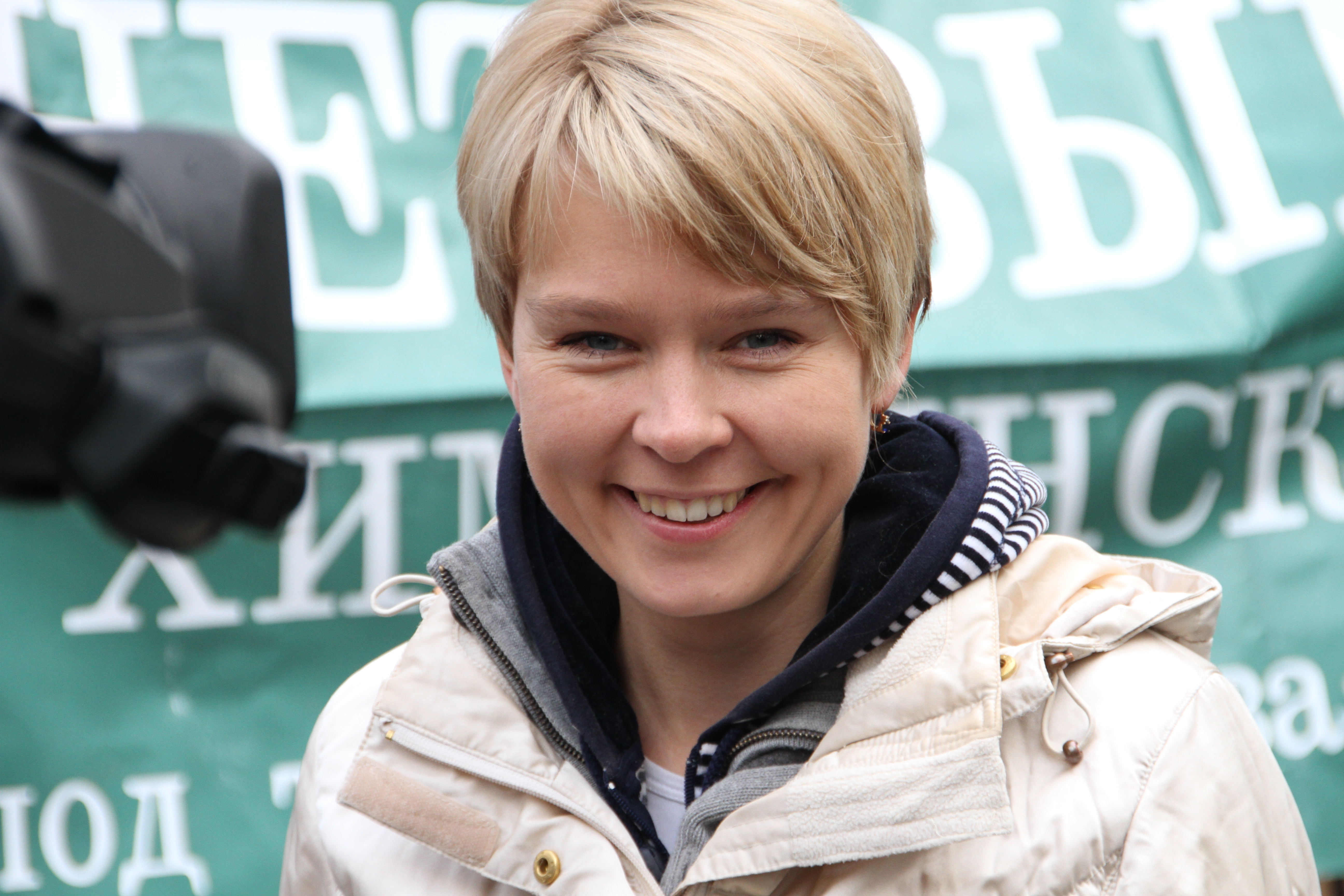 Евгения Чирикова, российский общественный деятель, защитник Химкинского леса. Фото сделано во время схода жителей в химкинском парке им. Толстого